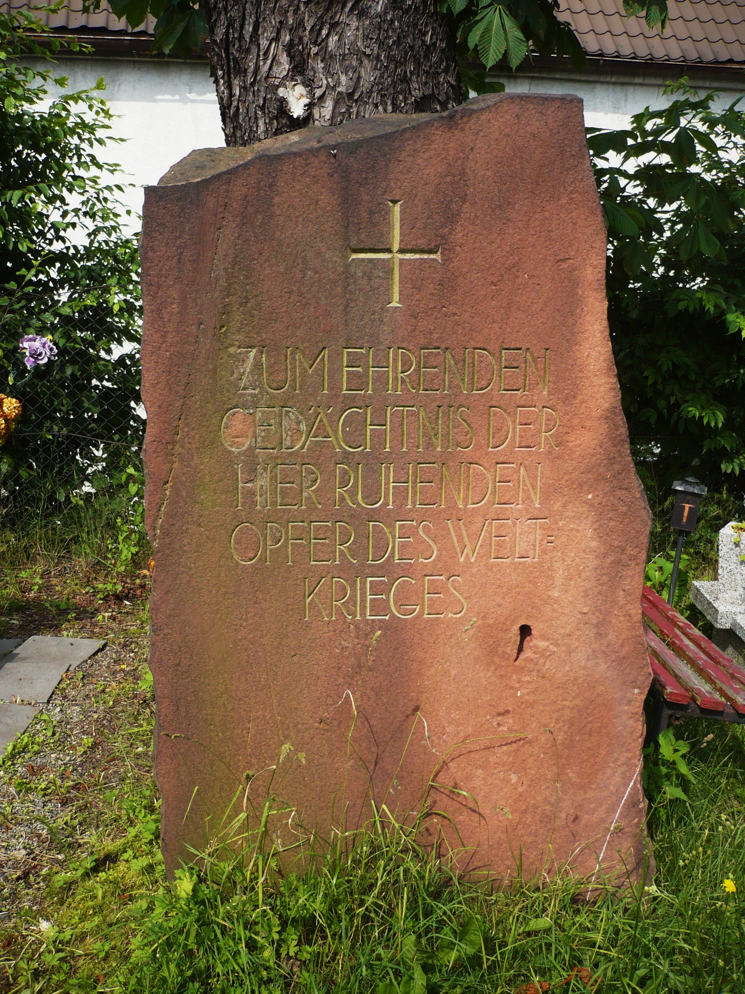 Nowa Ruda, ul. Cmentarna - cmentarz komunalny (obelisk poświęcony żołnierzom I wojny światowej)